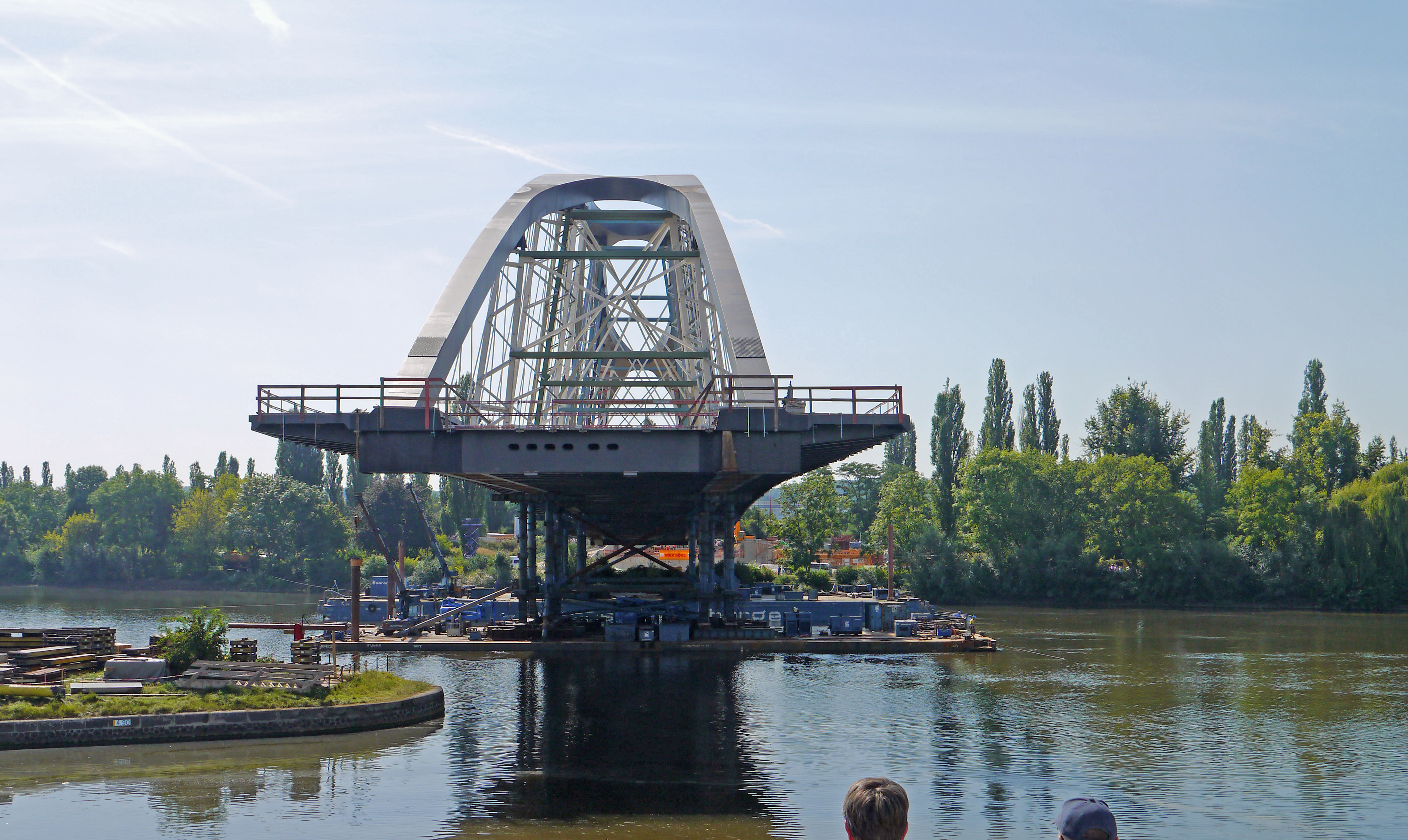 Die Osthafenbruecke waehrend des Einschwimmens, am 23. August 2012, um 10 Uhr 20. Blick vom noerdlichen Mainufer, an der Hafeneinfahrt in Frankfurt am Main.